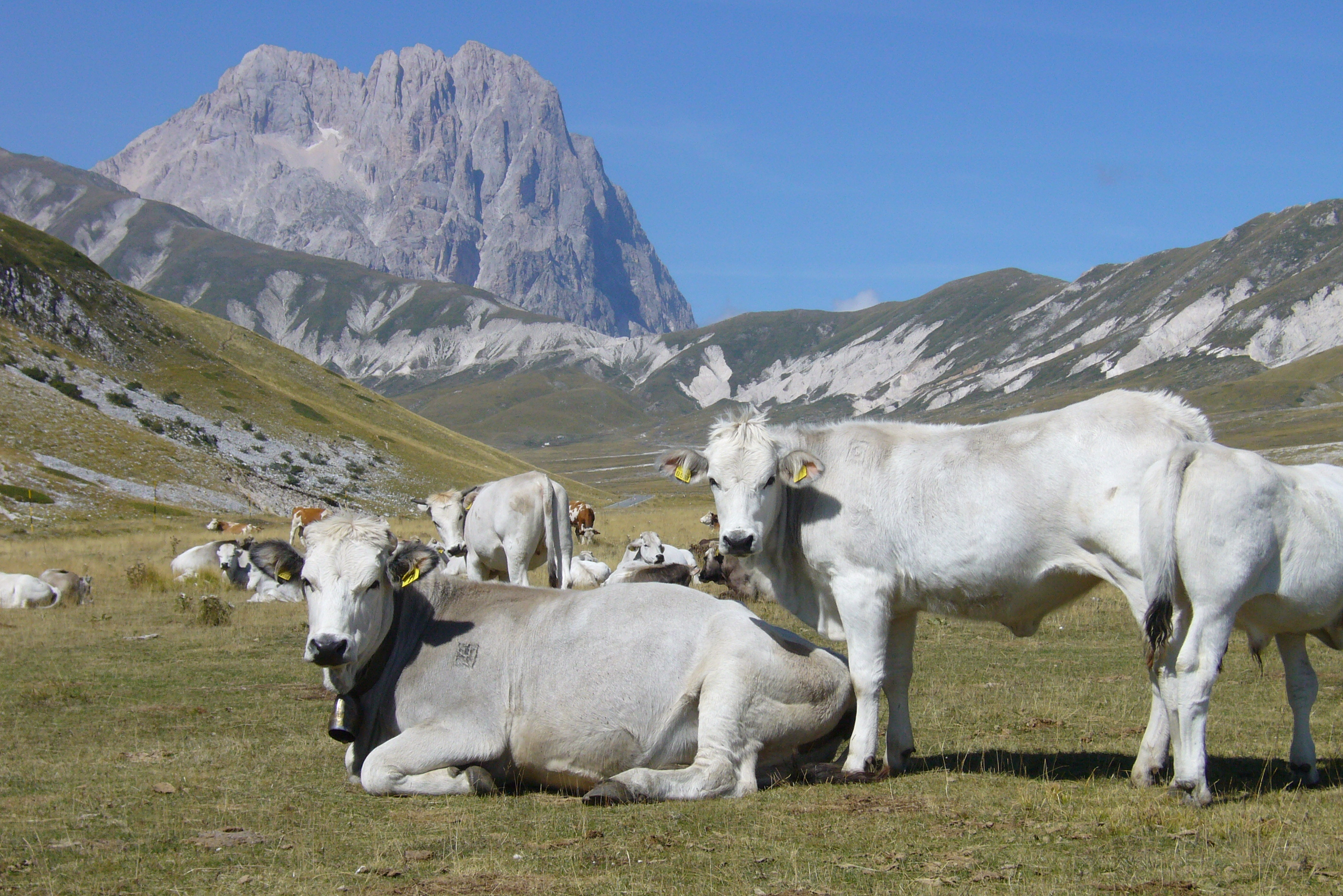 Mucche al pascolo sotto il Corno Grande